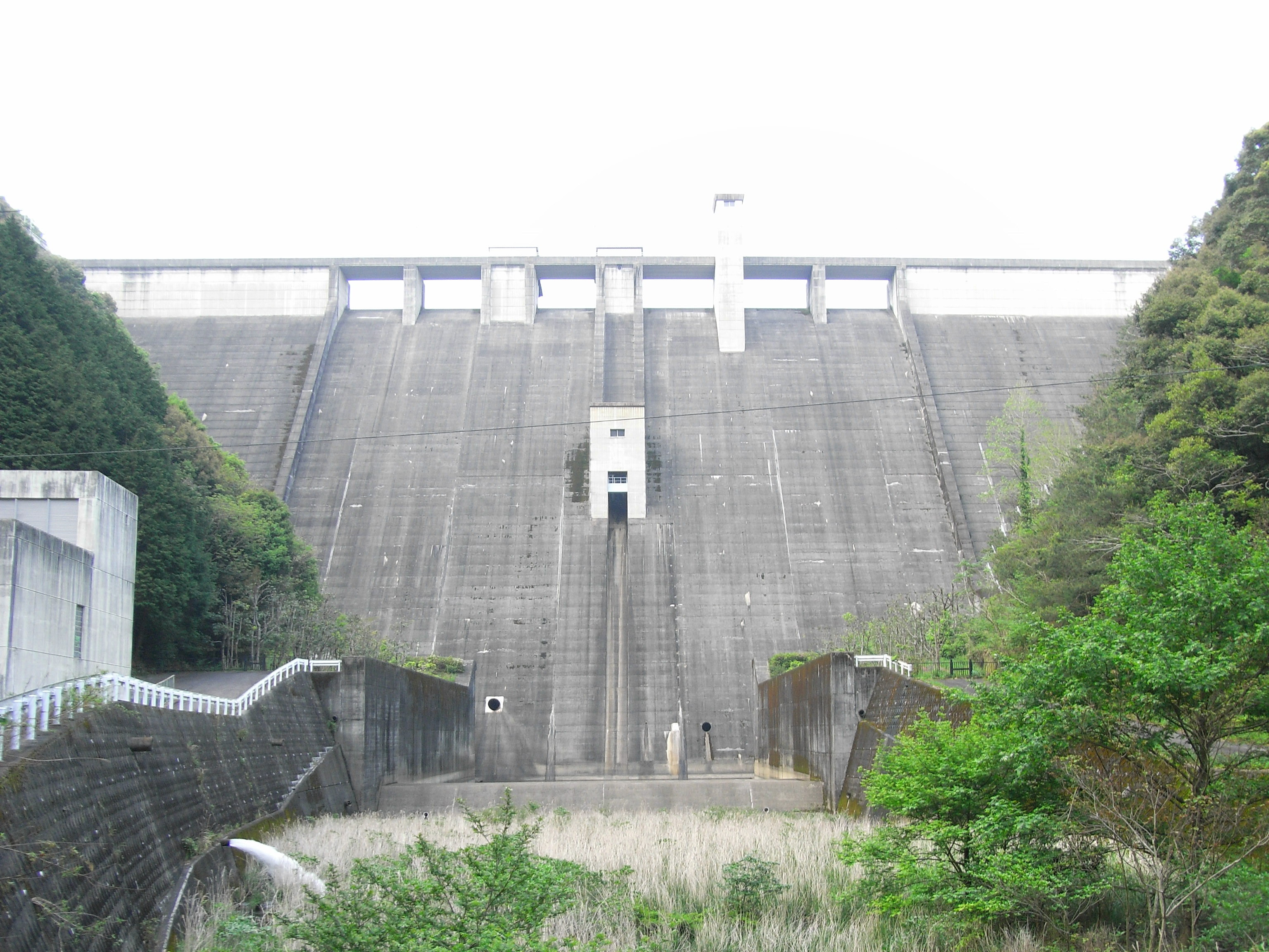 Dam